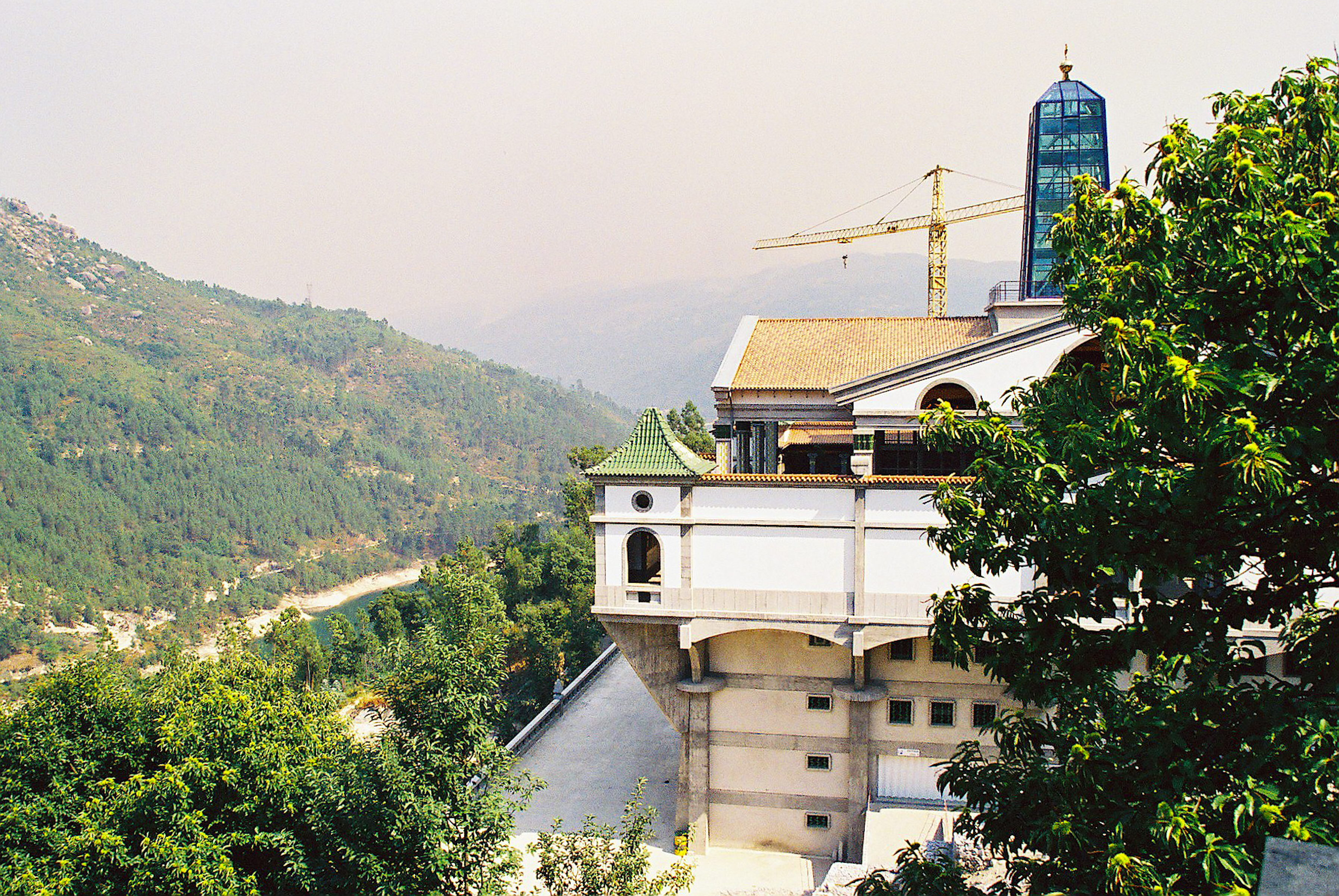 S. Bento da Porta Aberta - Terras de Bouro